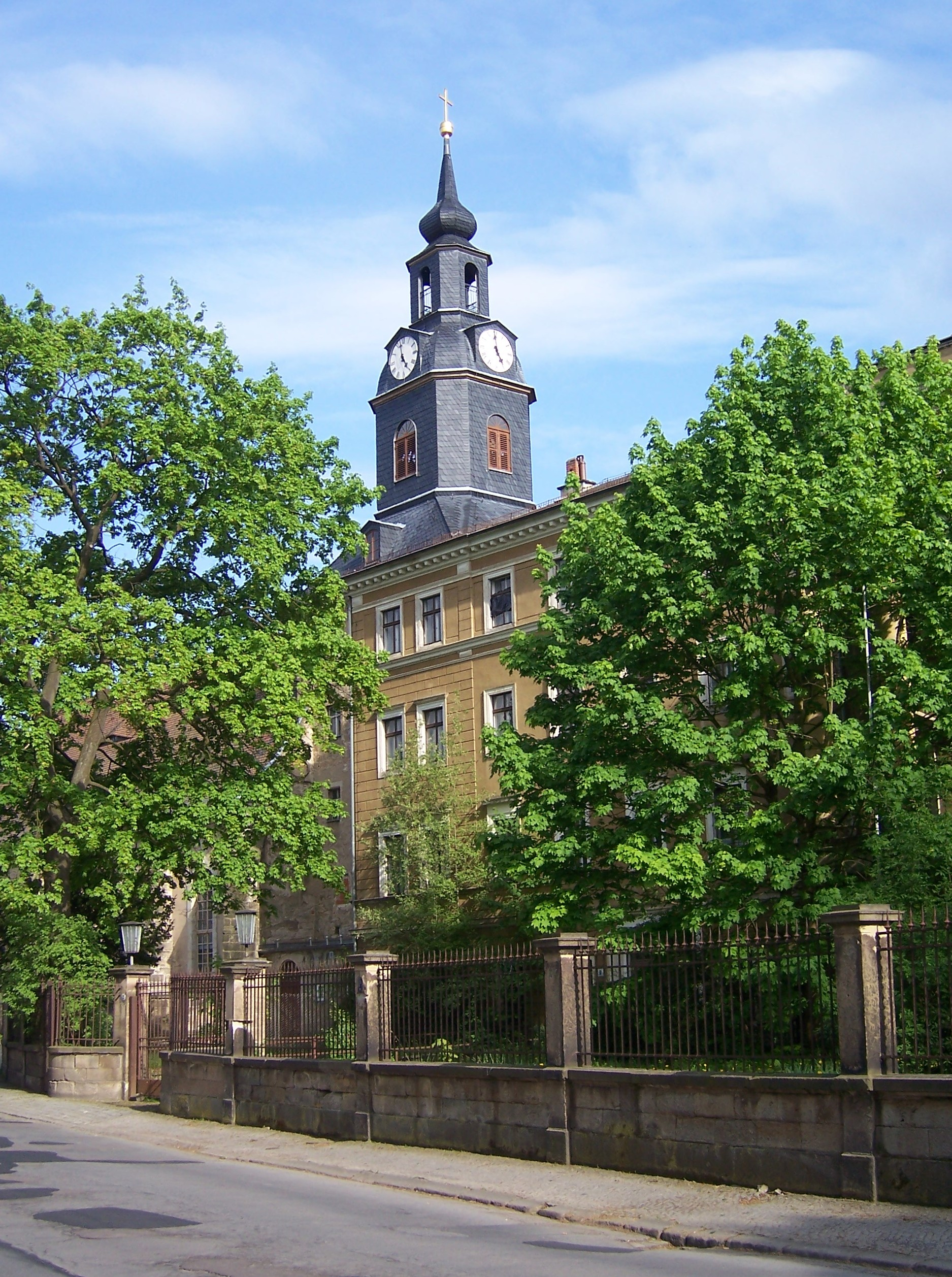 Die Schlosskirche in Dresden-Lockwitz.